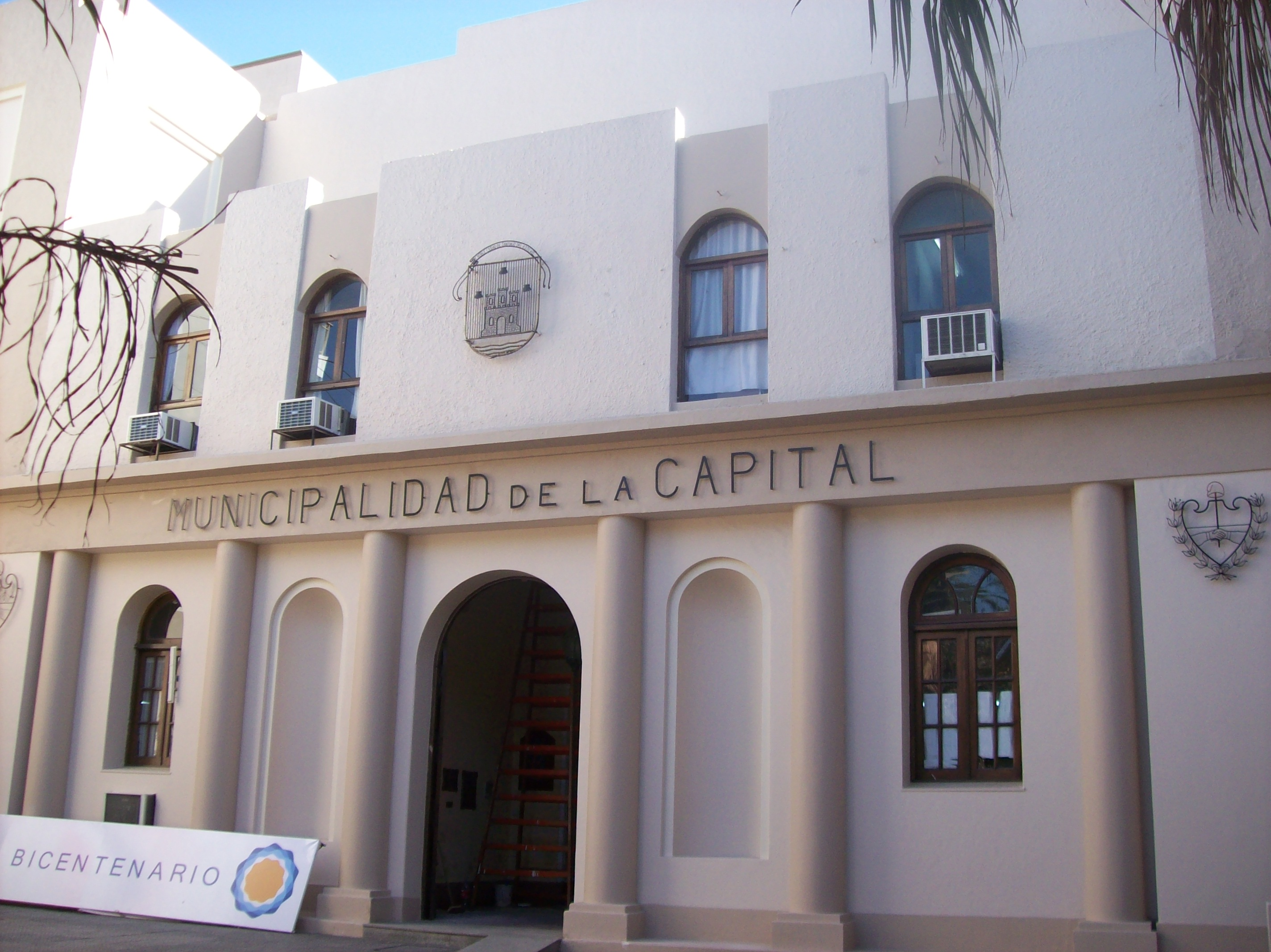 Municipalidad de la Capital frente a la Plaza Libertad, en Santiago del Estero, provincia de Santiago del Estero, Argentina.